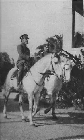 L'amiral français Emile Guépratte en compagnie du colonel serbe Georgevitch à Bizerte. Ils visitent le camp des réfugiés Serbes après la retraite de l'armée par l'Albanie.